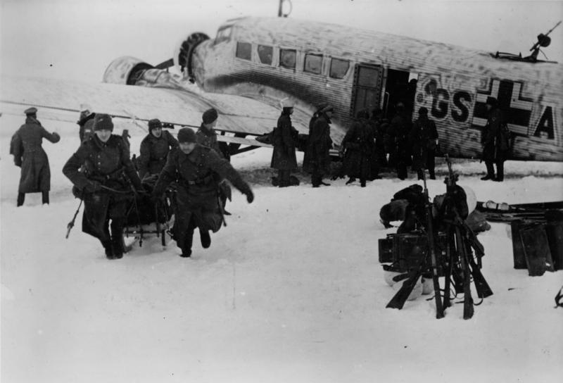 Scherl: Festung Demjansk: 4. Monate lang wurden die Truppen in der Festung Demjansk mit der Ju 52 versorgt. Verpflegung, Munition, Waffen, Truppen sozusagen alles schaffte die Ju 52 nach vorn und nahm die Verwundeten und Kranken mit in die Heimatlazarette.